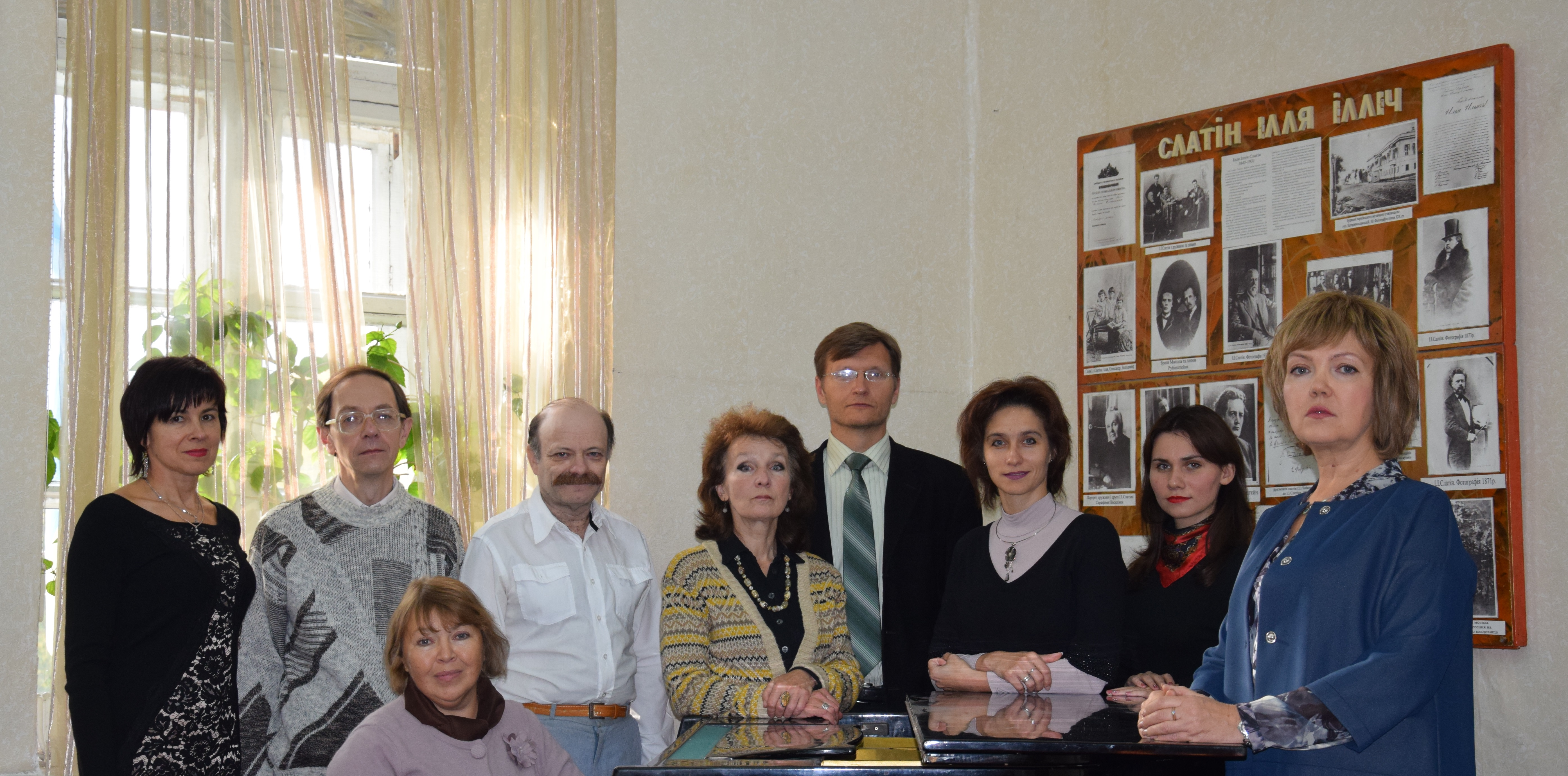 Педагоги отдела музыкальной литературы Харьковского музыкального училища им. Б.Н.Лятошинского.